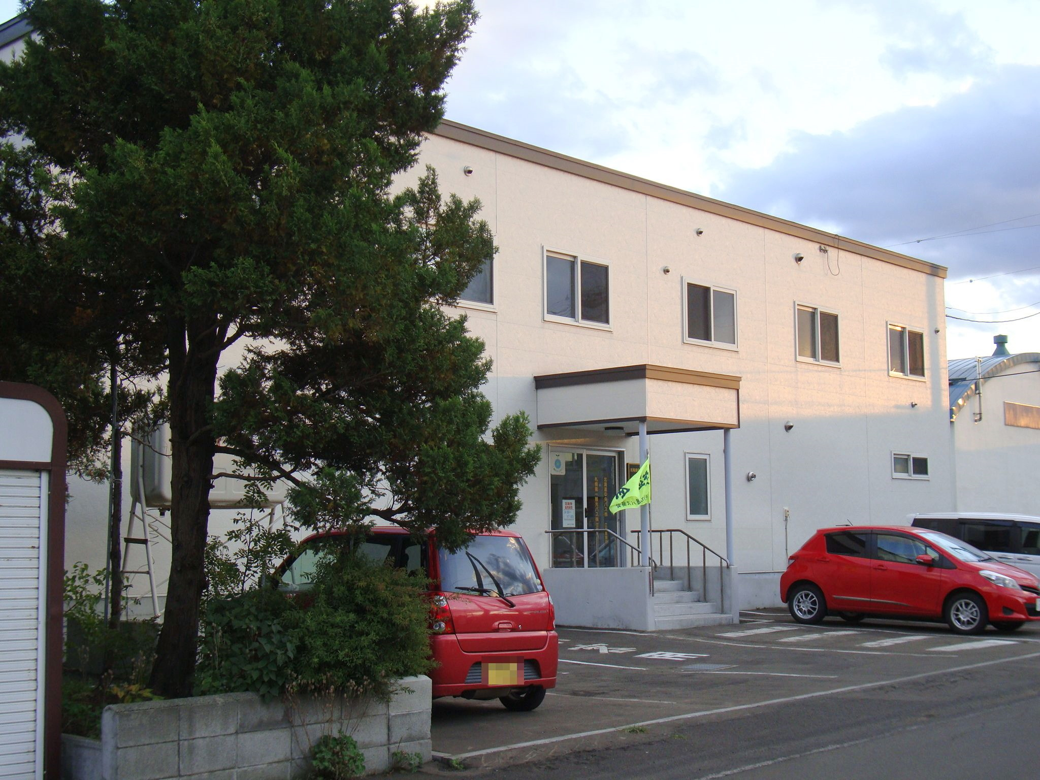 Ebetsu depot